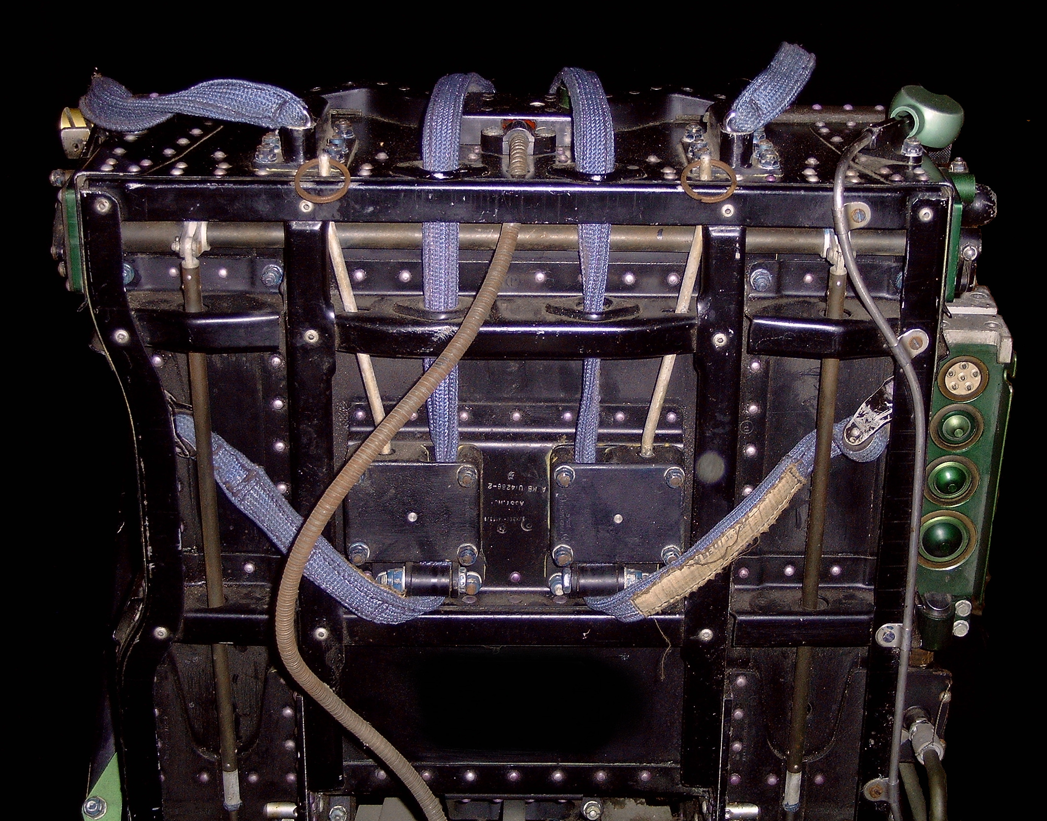 Schleudersitzunterseite eines MK.GT5